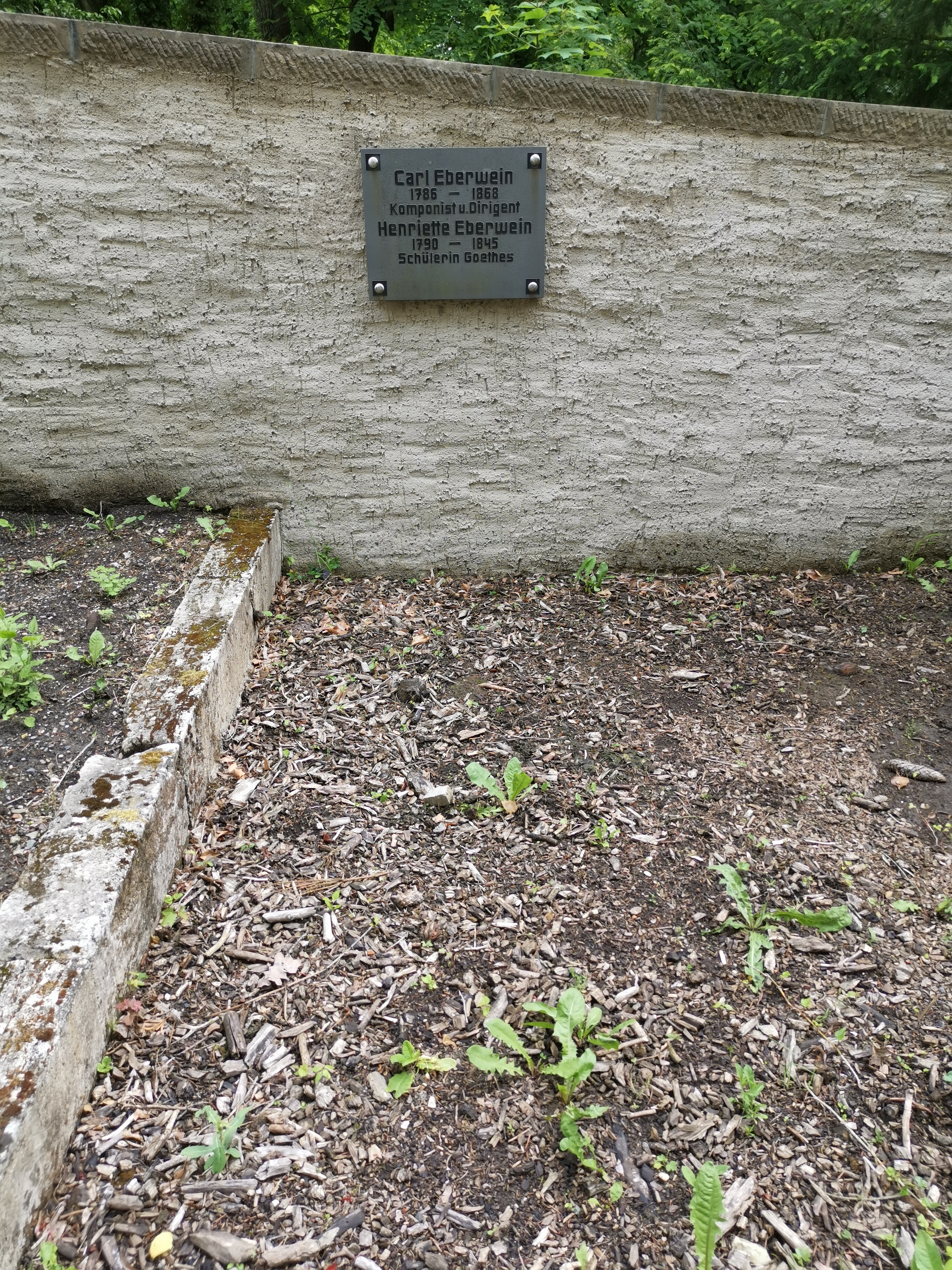 Gedenktafel Carl und Henriette Eberwein; Historischer Friedhof Weimar